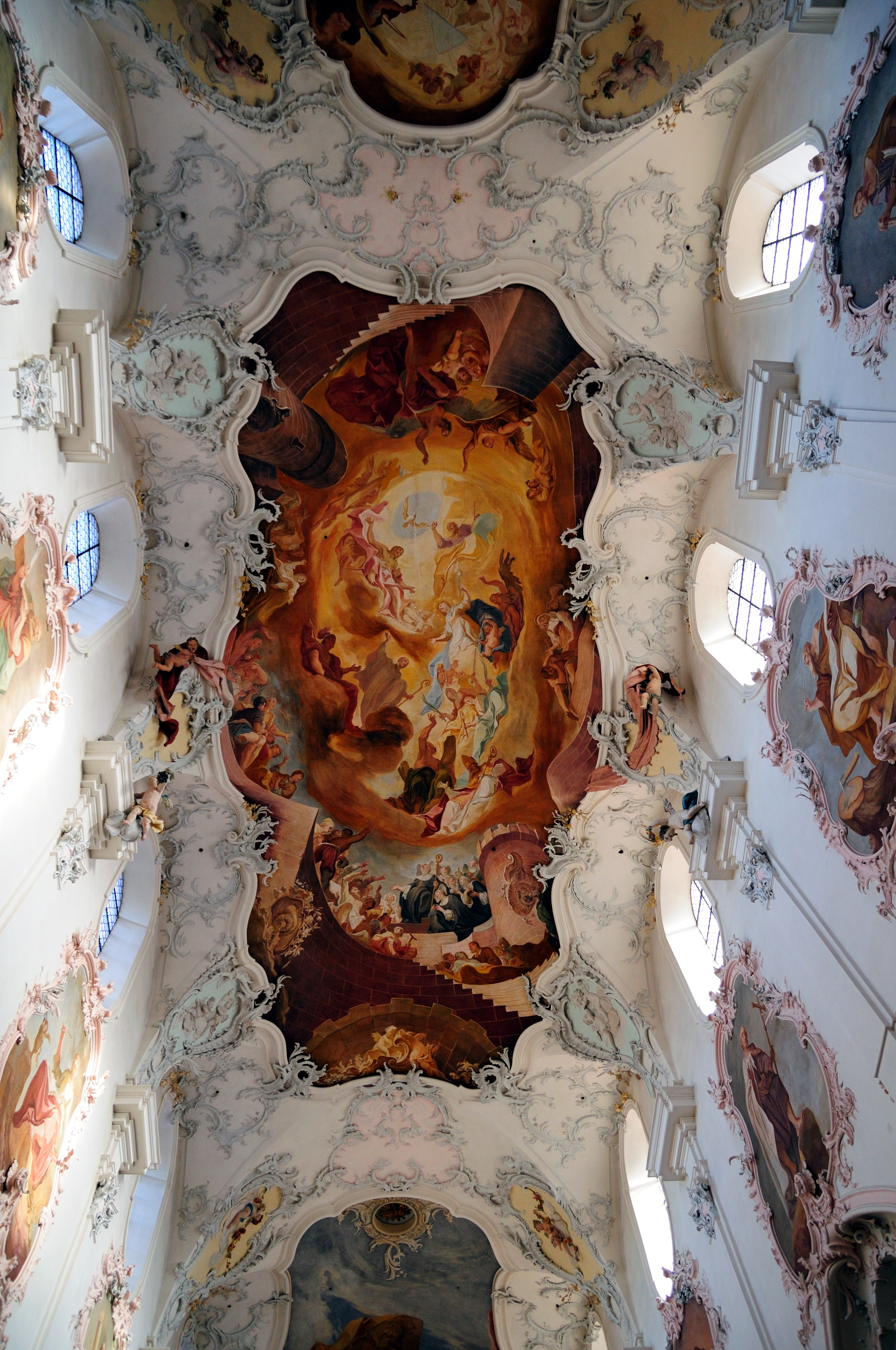 Deckenfresko Fridolinsmünster, Bad Säckingen: Die Apotheose des heiligen Frdolin (Hauptfresko des Mittelschiffs von Frank Joseph Spiegler)